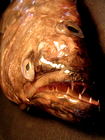 Flétan du Groënland. Les yeux ont été renfoncés par le vaccum. Photo prise par Matthieu Godbout, aux Îles-de-la-Madeleine, à l'été 2006.